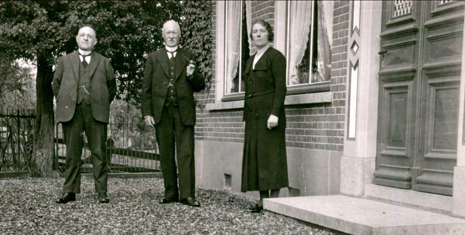 Midden: Wijnandus Johannes van Slijpe (1858-1943), burgemeester van Goudriaan en Ottoland, geflankeerd door zijn zoon Rogier Diederik Christiaan van Slijpe en schoondochter Teuntje Van Slijpe-Korevaar, voor de deur van de ambtswoning aan de Zuidzijde 134 in Goudriaan.